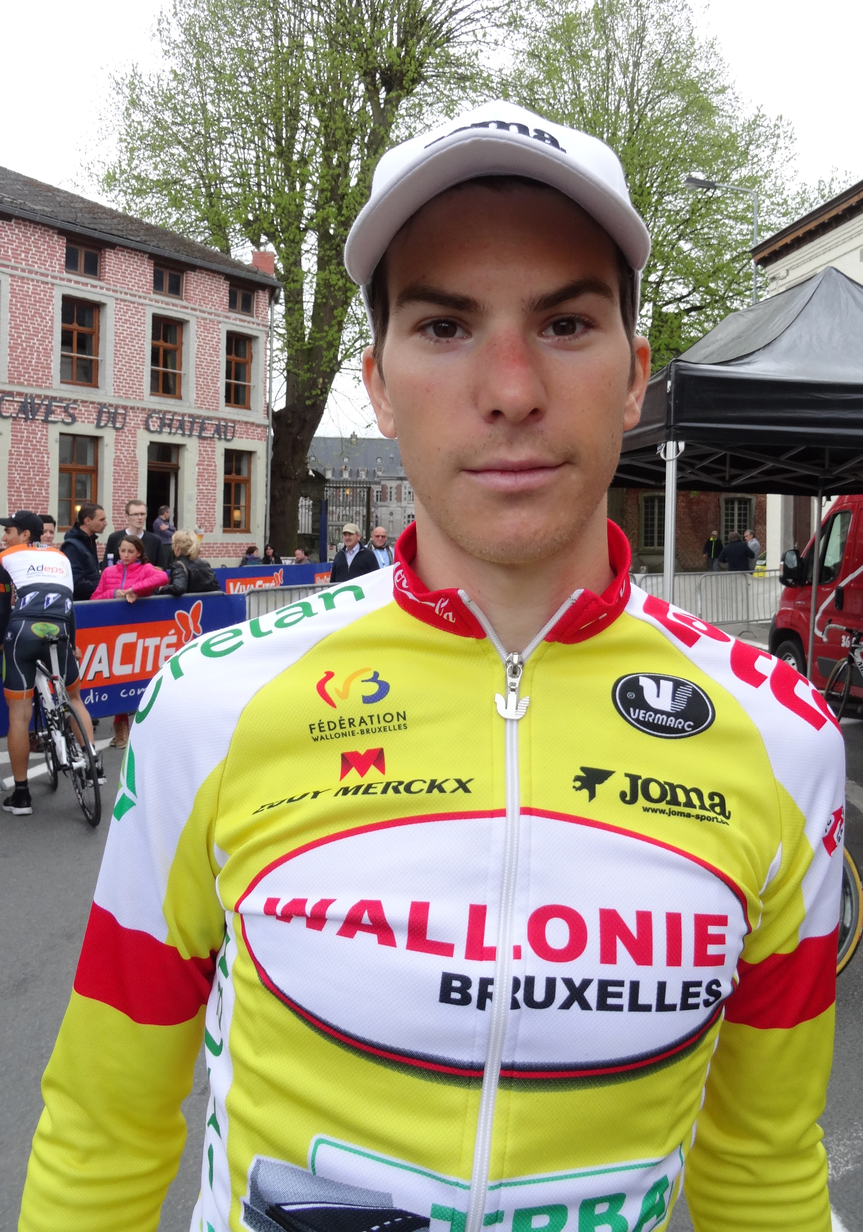 Triptyque des Monts et Châteaux 2014, étape 3, 6 avril 2014, départ de Belœil. Depicted person: Julien Stassen Depicted team: Wallonie-Bruxelles The creation of these files was made possible thanks to the organizers of the Triptyque des Monts et Châteaux 2014 English | français | +/−